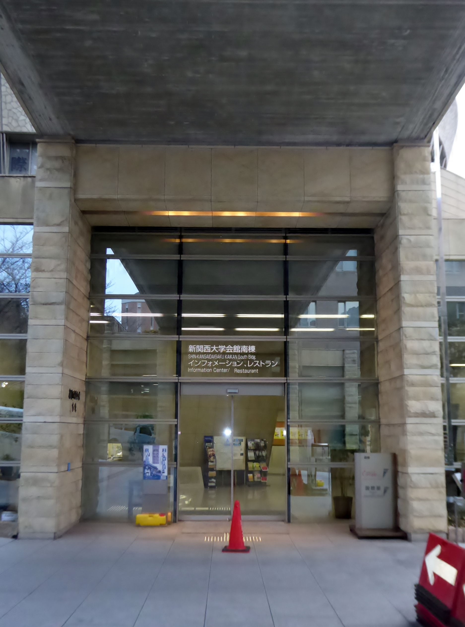 新関西大学会館南館を撮影。